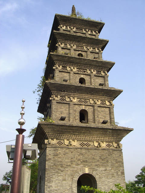 九華山公園 三藏塔 2004年4月28日撮影 撮影者：権作 参照：